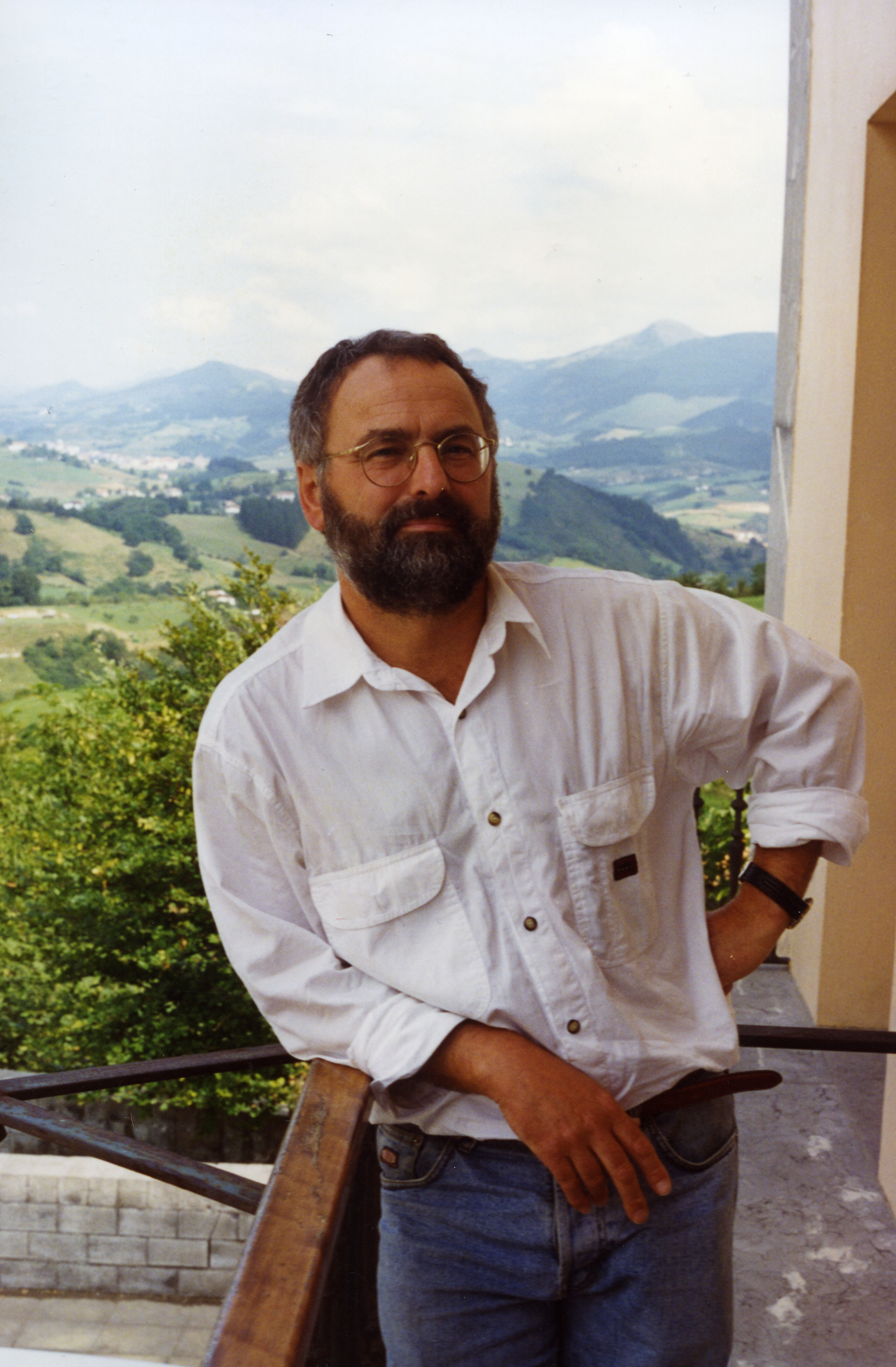 Mapa toponimikoaz. Aiurri 20 zbk. 3. orr.